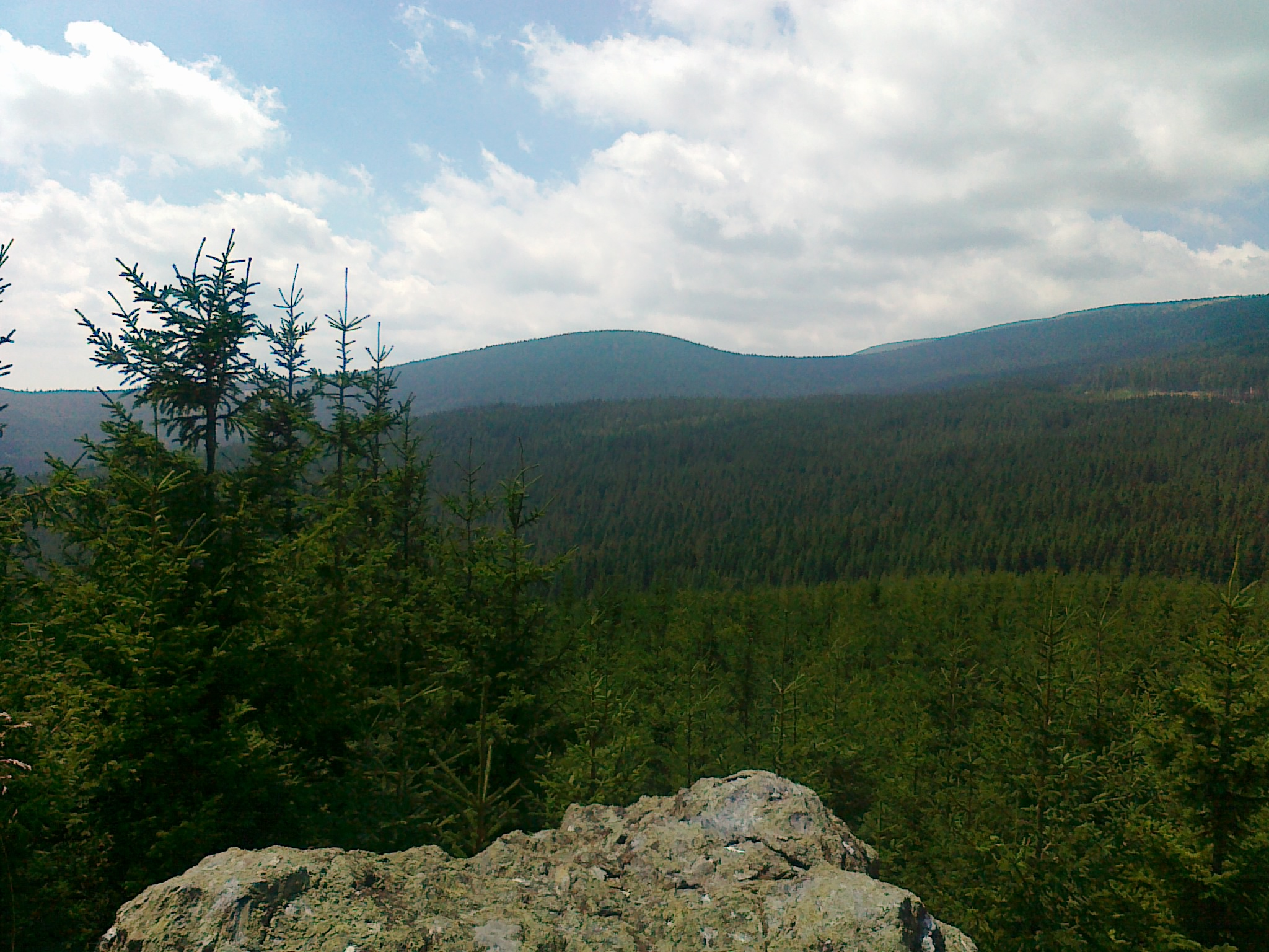 Widok ze skaliska blisko szczytu Hradečná w kierunku góry Temná